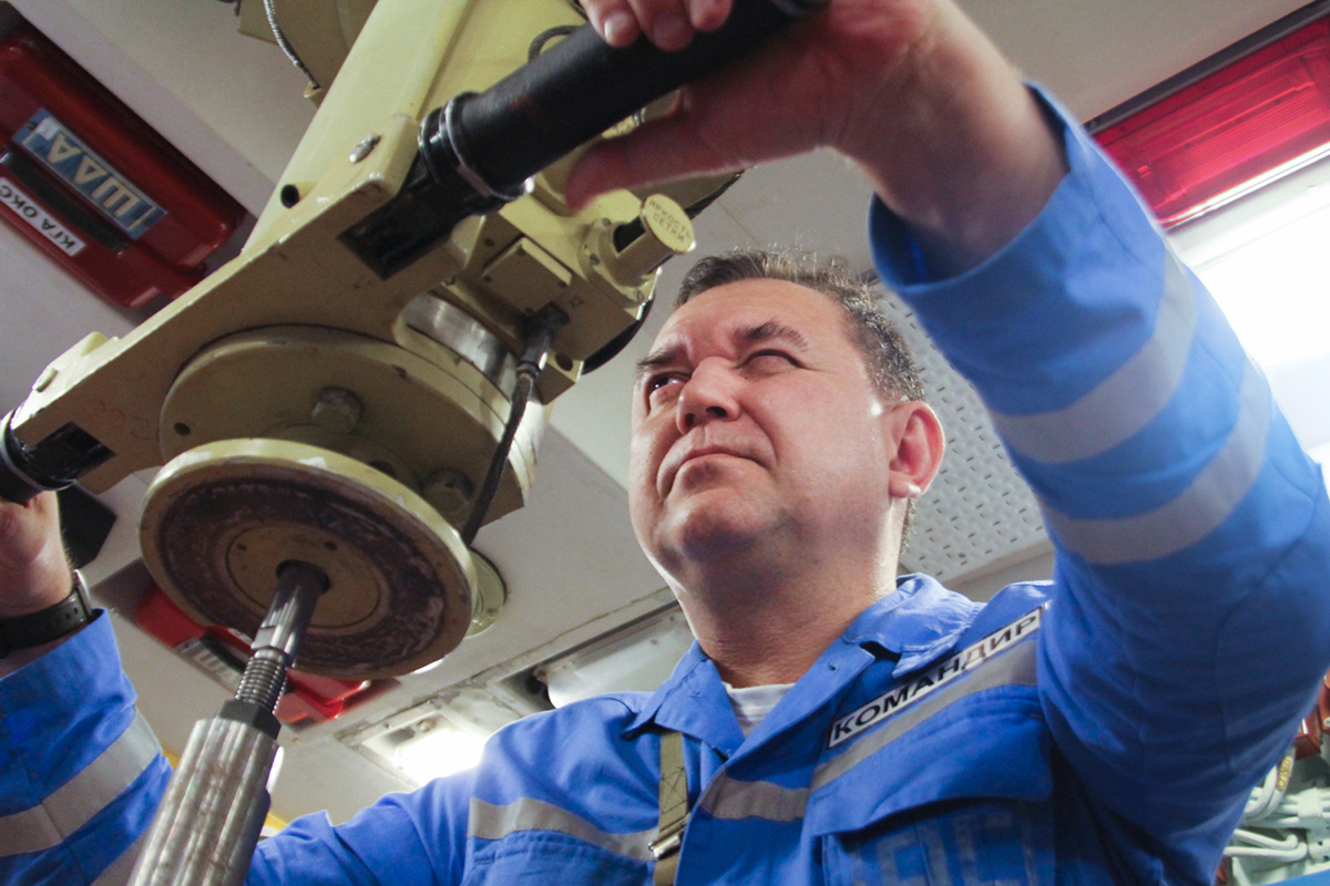 Владимир Ширин, командир первого экипажа подводной лодки К-535 «Юрий Долгорукий» проекта 955 «Борей», у перископа.